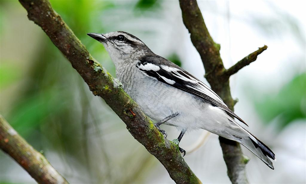 Pied Triller, male (Lalage nigra striga)